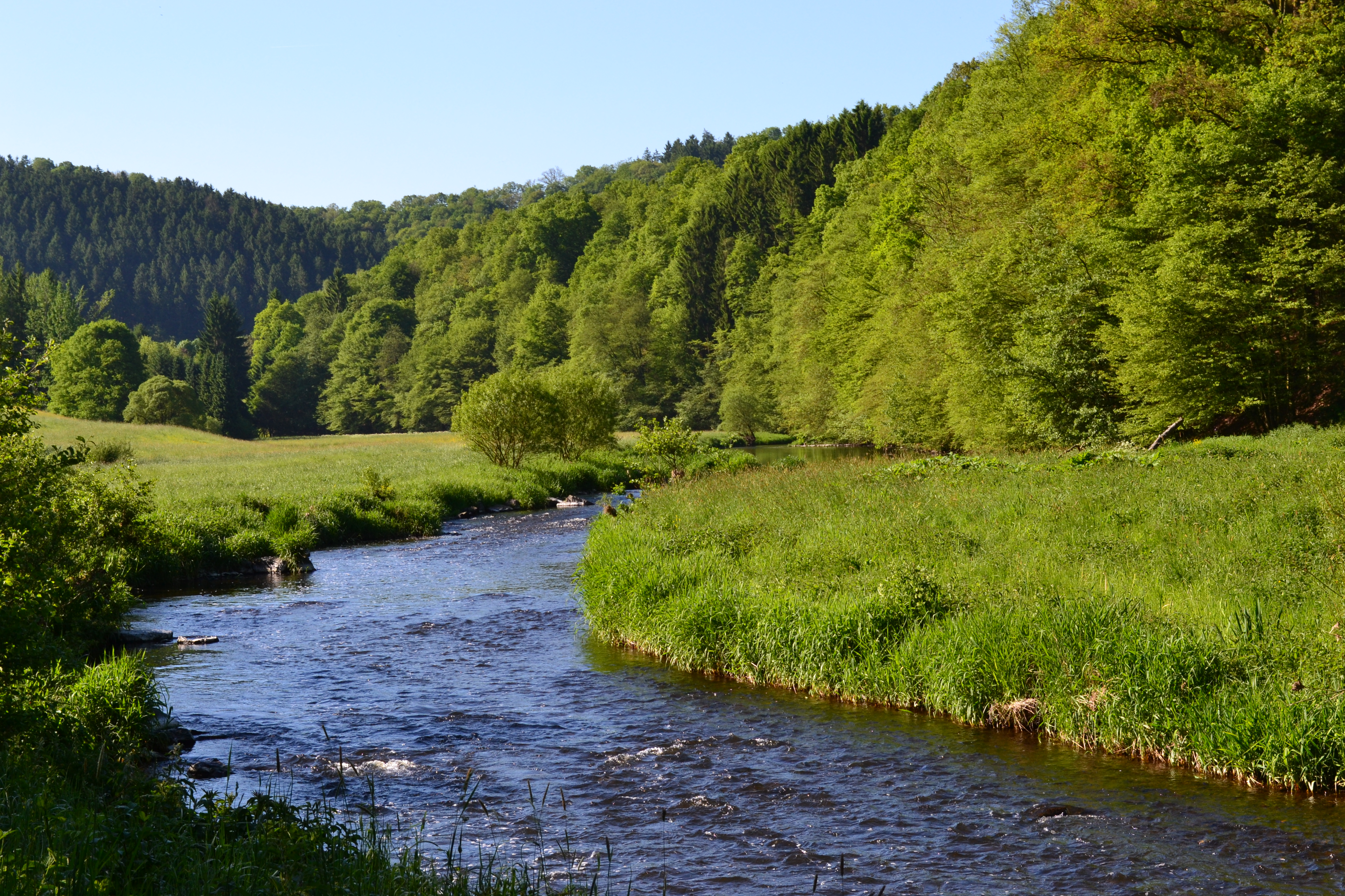 Blick ins Nistertal bei Helmeroth, FFH-Gebiete Nistertal und Kroppacher Schweiz